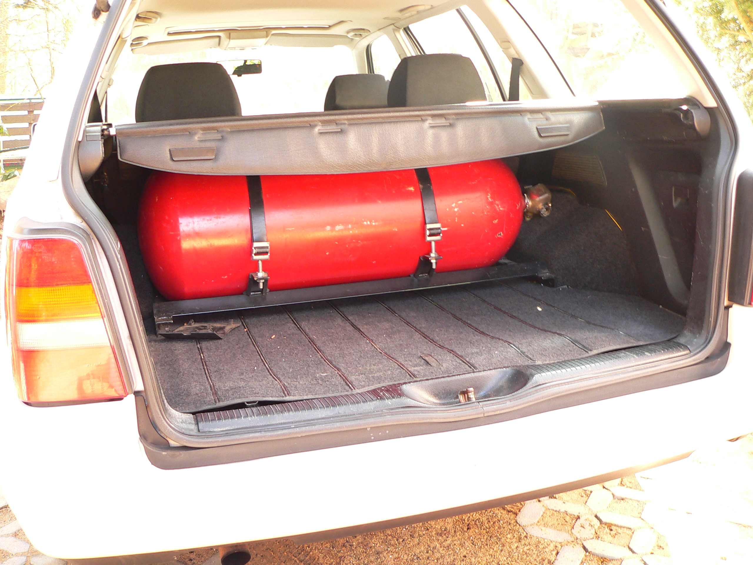 KFZ-Erdgastank Պատկեր:KFZ-Erdgastank.JPG